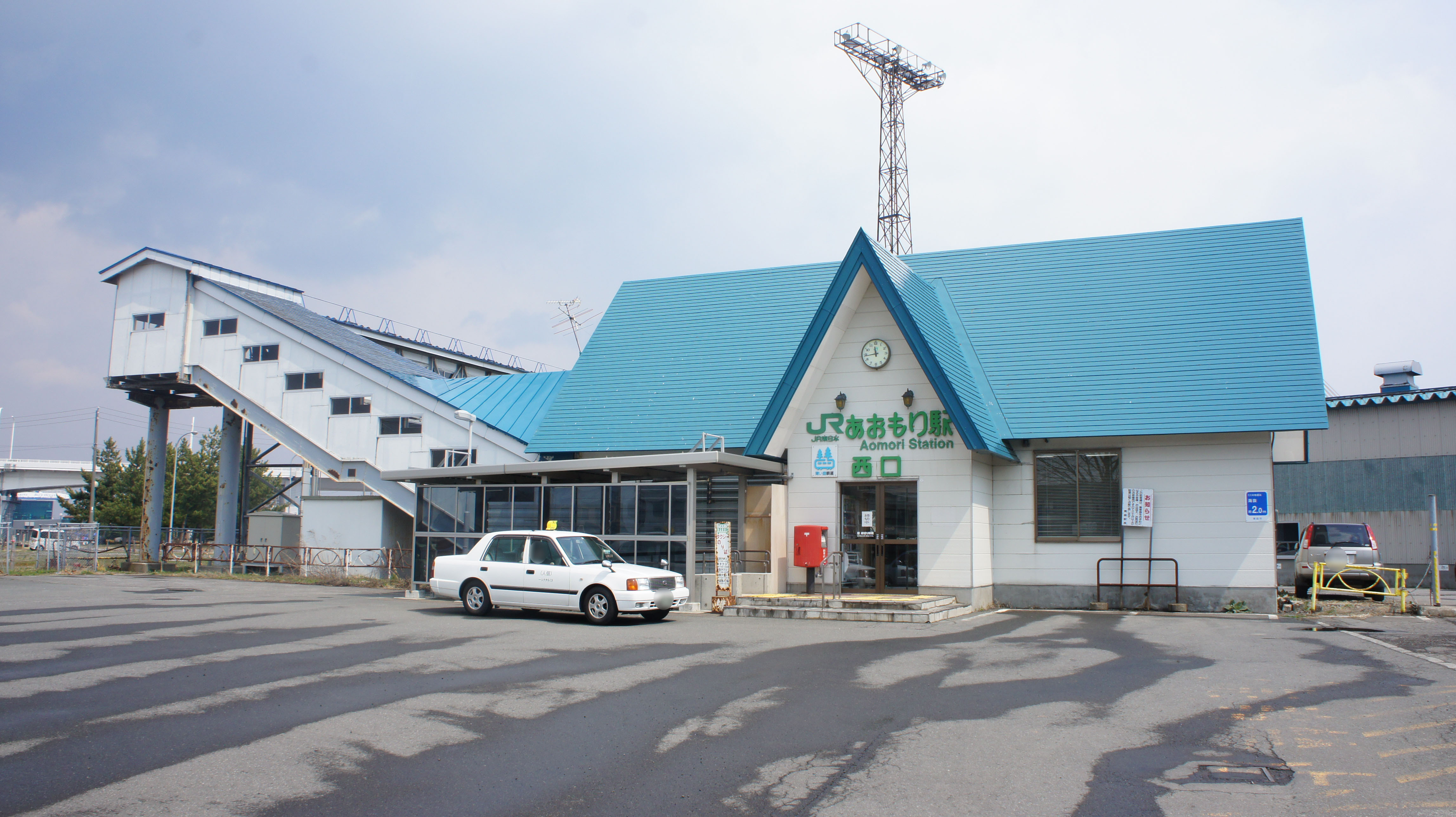 青森駅の西口駅舎